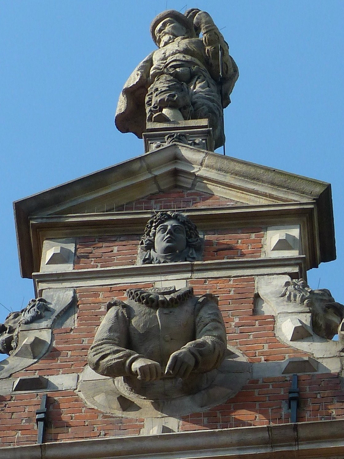 Gdańsk Śródmieście, rzeźba bezgłowego klucznika na wschodniej ścianie Katowni.